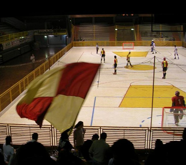 Campionato italiano di Hockey su pista Amatori-Prato 15 gennaio 2005